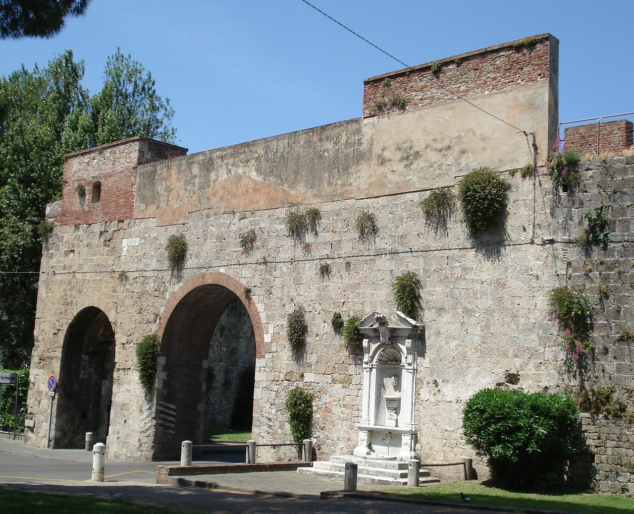 Pisa: Tratto delle mura in Piazza delle Gondole, con la Fontana Medicea